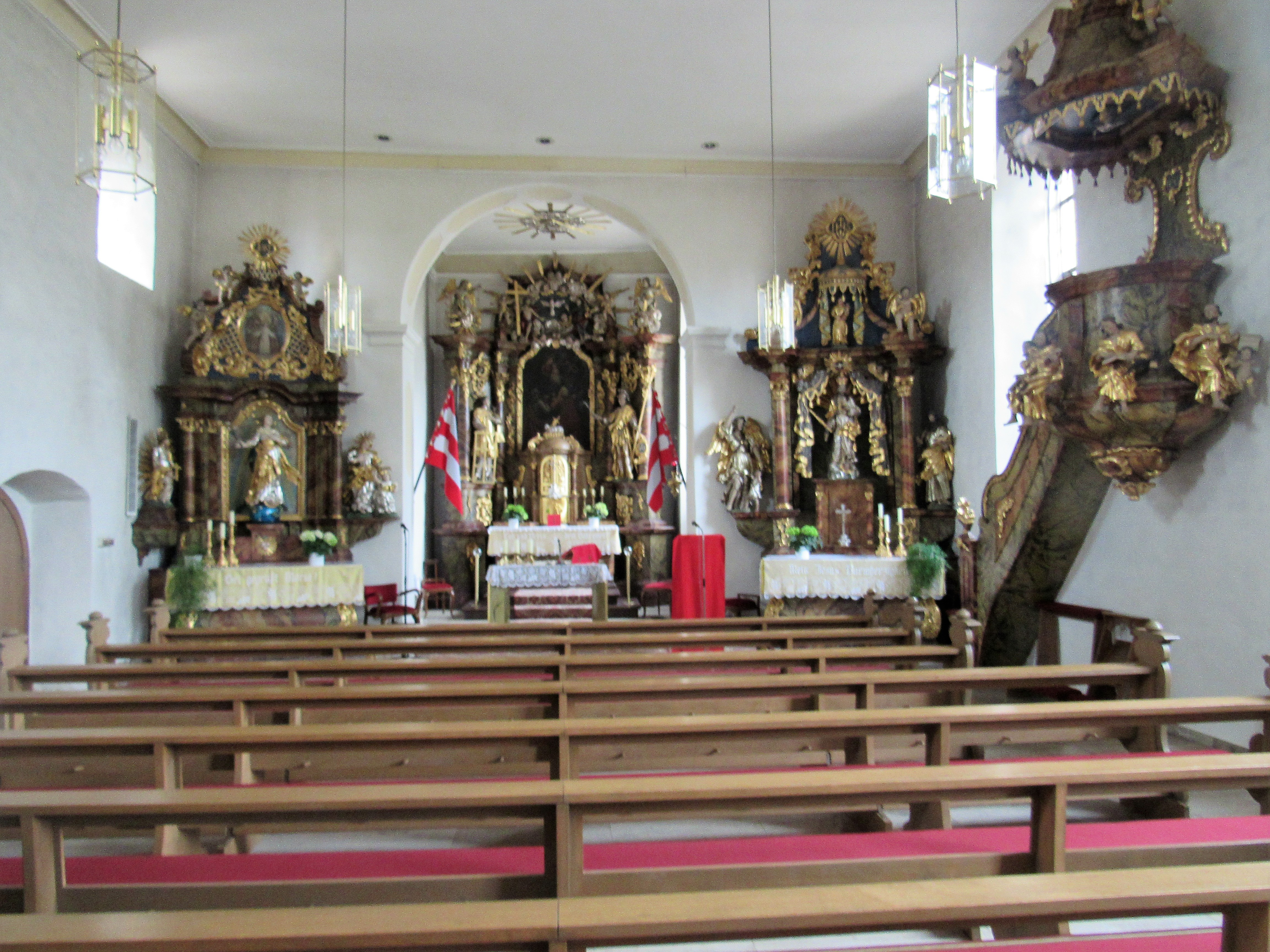 Inneres der Kirche